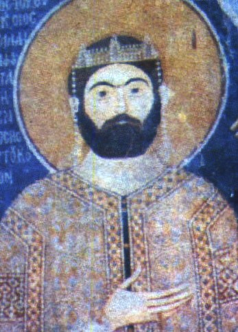 деспот Иван Драгушин